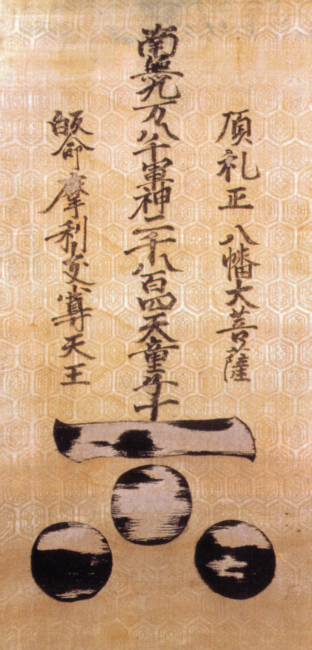 毛利元就軍幟